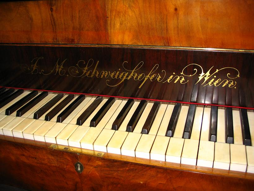 Inschrift "J. M. Schweighofer in Wien" auf Klaviaturdeckel